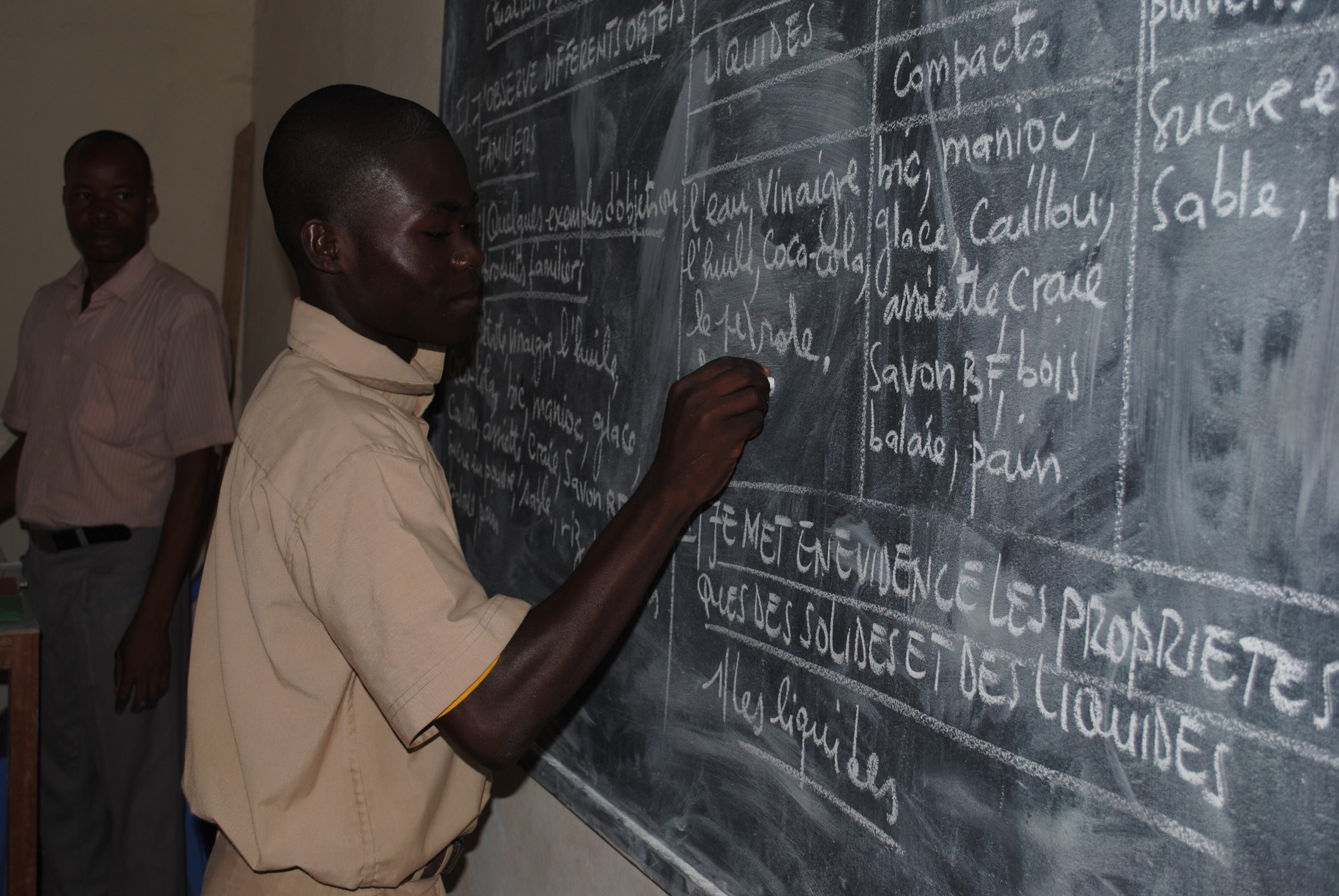 Collégiens dans une classe du Groupe scolaire André Latrille à Abidjan, Côte d'Ivoire